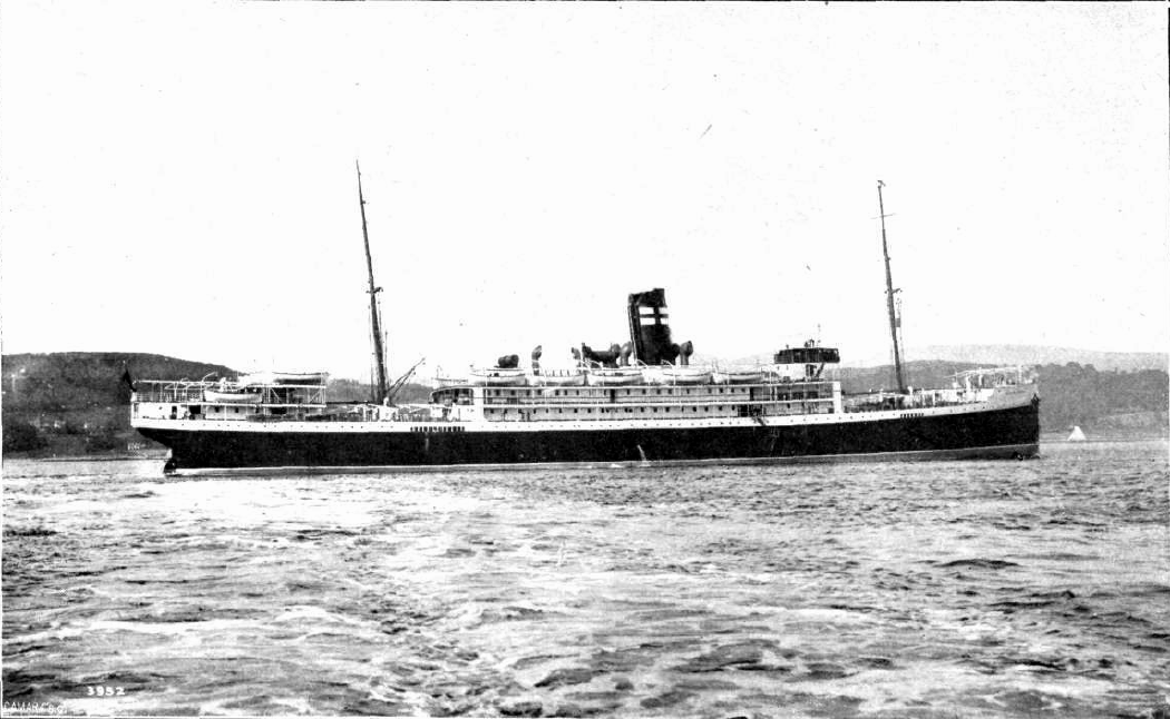 Fotografía del vapor correo transatlántico Infanta Isabel publicada en 1912 con motivo de su puesta en servicio. Había sido construido en Escocia para la Sociedad Naviera Gaditana Sres. Pinillos, Izquierdo y Compañía, e iba a zarpar de Barcelona el 1 de octubre con destino a Cádiz, Montevideo y Buenos Aires.